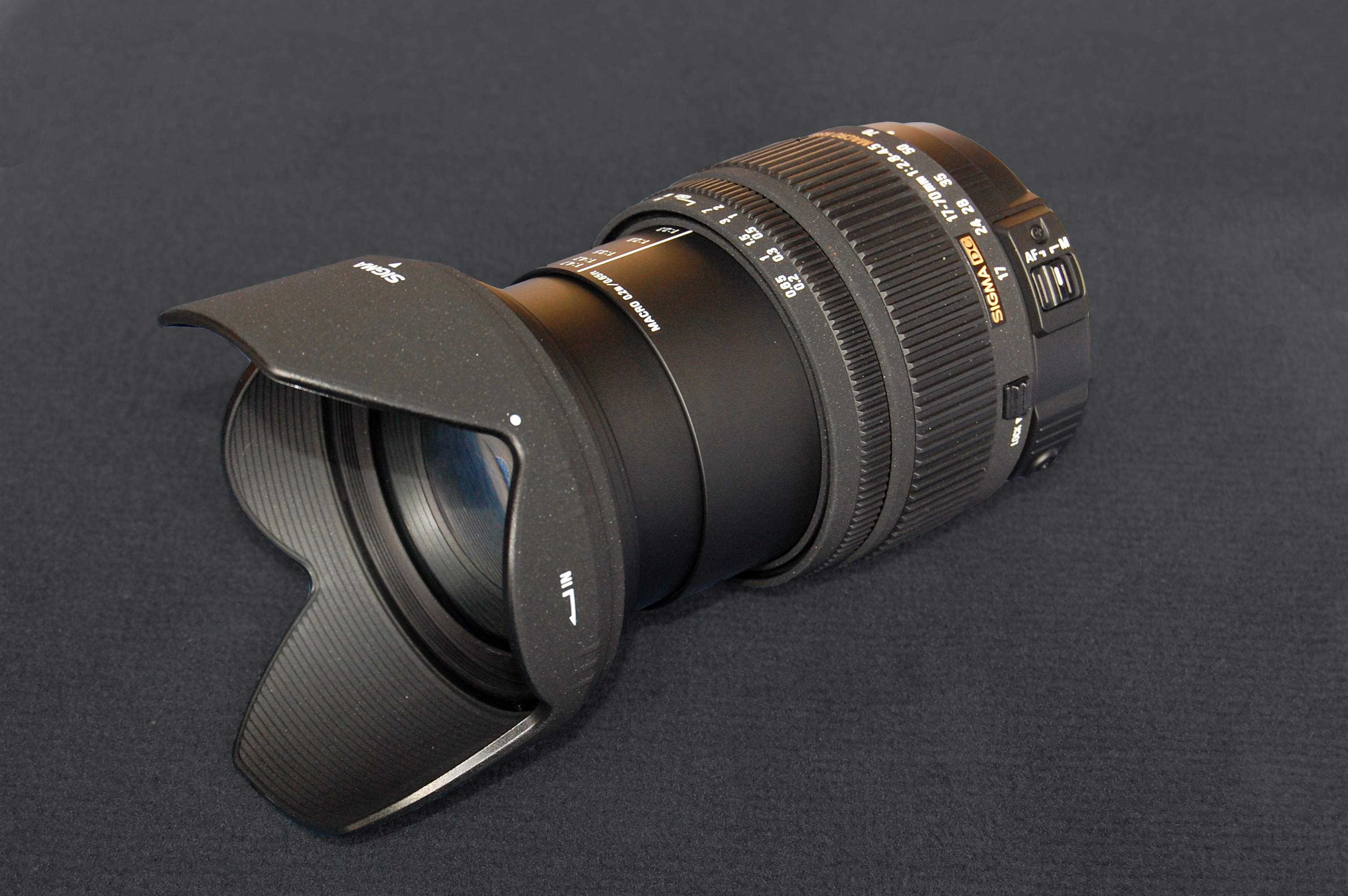 Sigma 17-70 f/2.8-4.5 DC Macro HSM